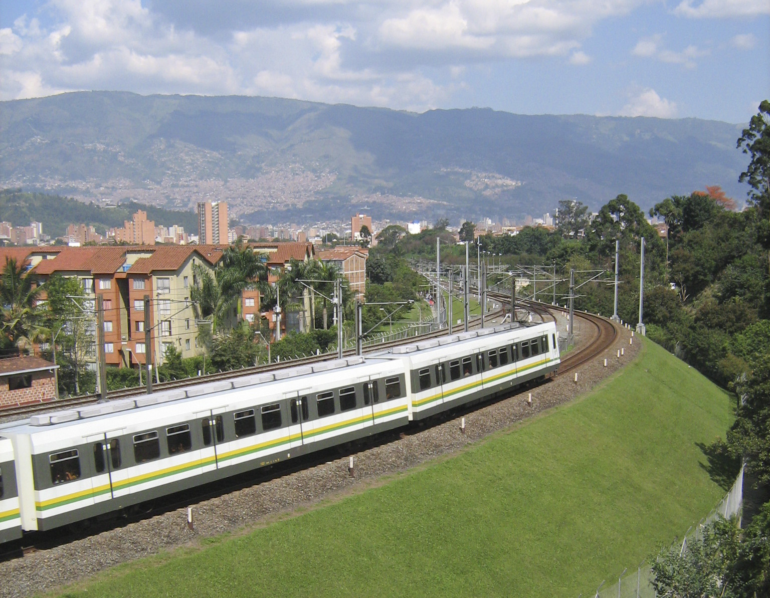 Metro de Medellín, Linea B sector San Javier. Colombia.